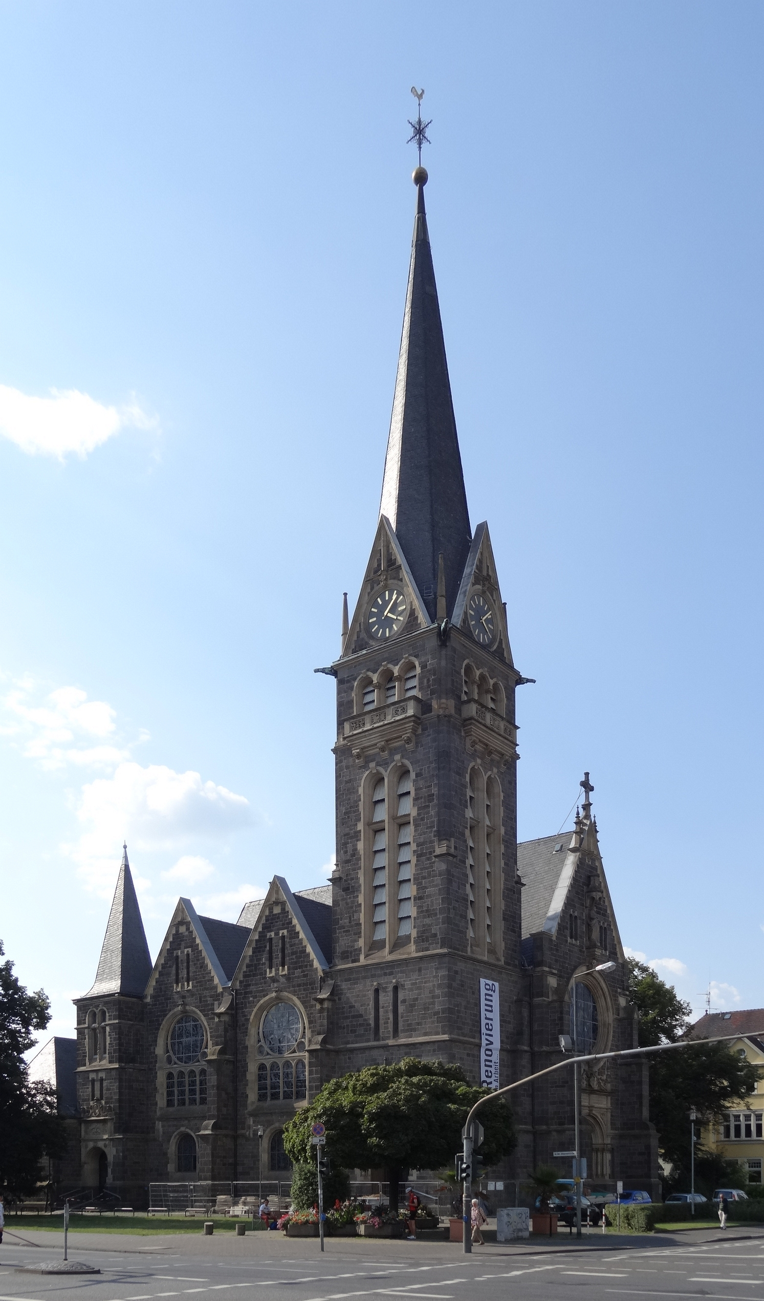 Johanneskirche Gießen von Südost